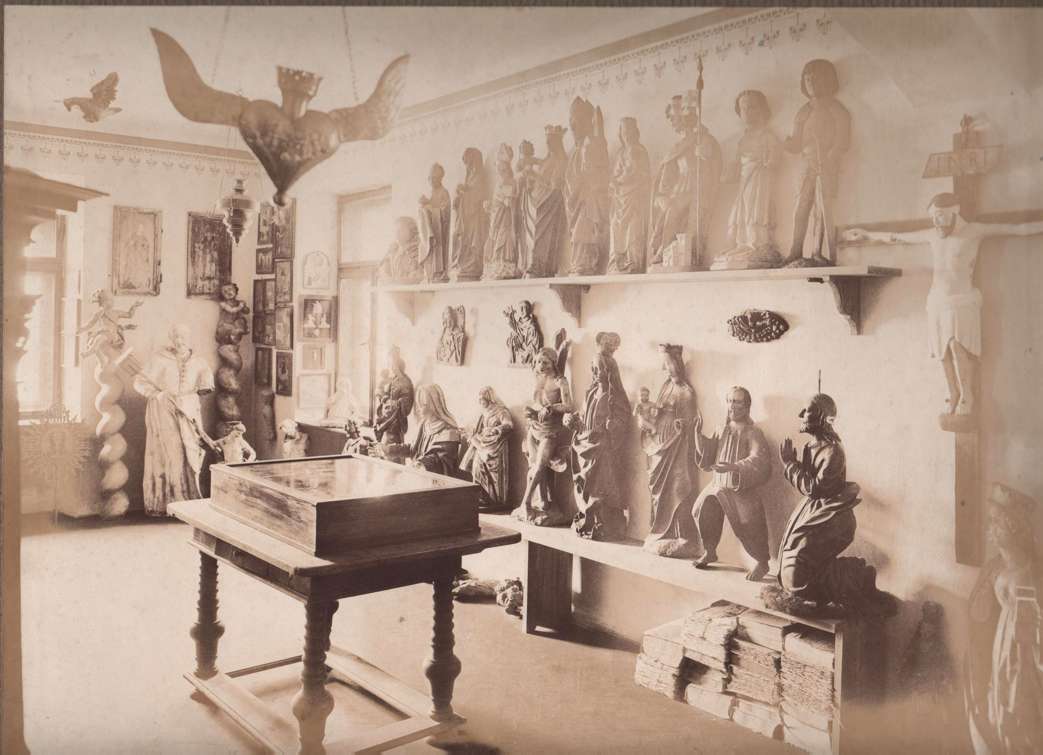 Die frühere Aufstellung des „Bezirksmuseums Bogen“ im Bezirksamt, 1911, Slg. Kreismuseum Bogenberg